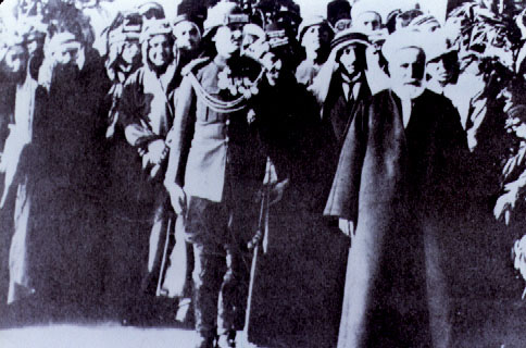 الشريف حسين بن علي اثناء زيارته إلى عمّان، على يمين الشريف حسين يقف حسن خالد أبو الهدى (رئيس الوزراء)، الشريف حسين بن ناصر، بيك باشا (قائد الجيش العربي)، وفي أقصى يسار الصورة المغفور له الملك عبد الله، تاريخ 1924م، المصدر مجموعة الجيش